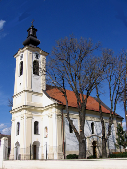 Orthodox church in Maradik, Vojvodina (Serbia)/L'église orthodoxe de Maradik, Voïvodine (Serbie)